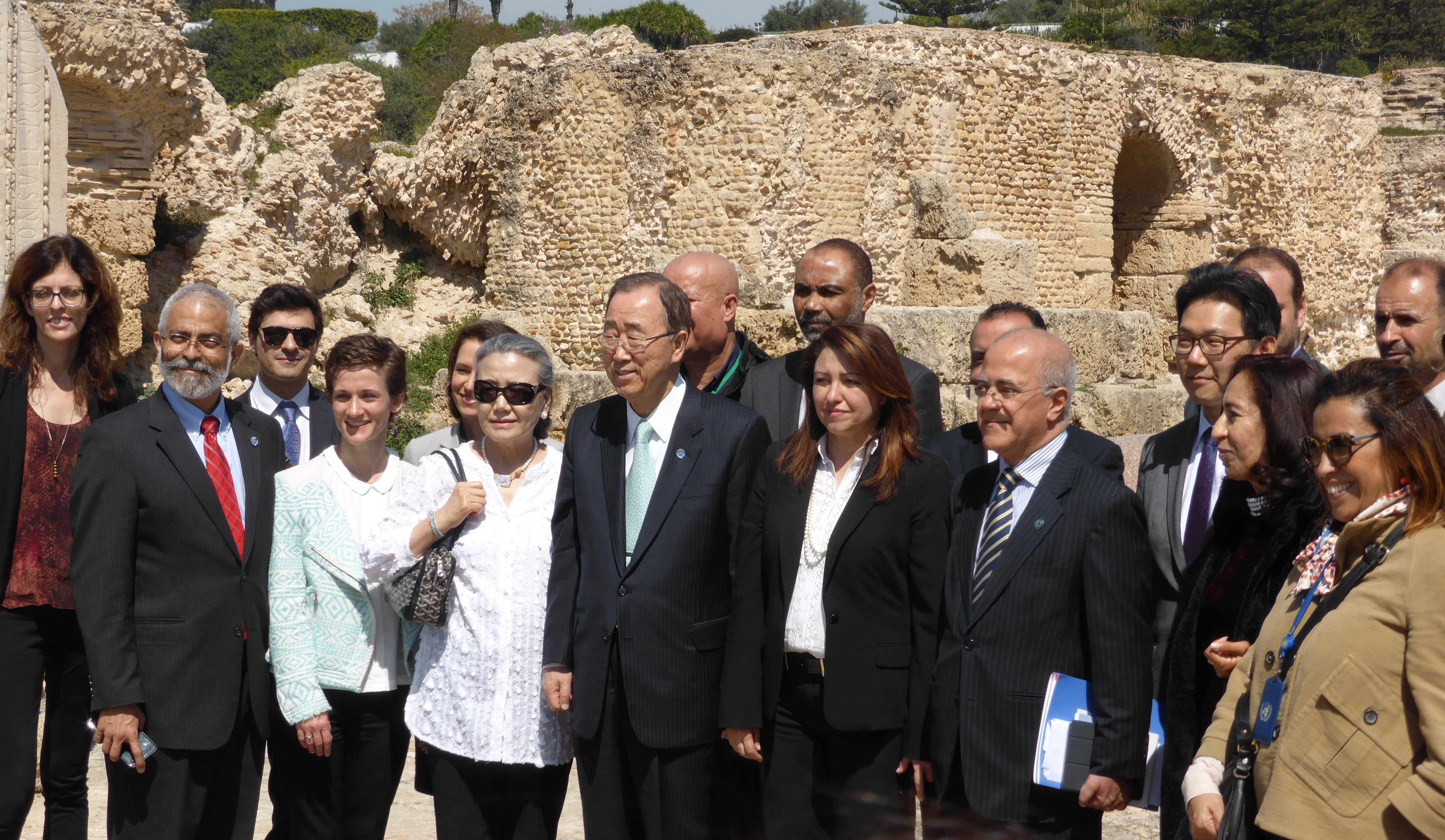 Le secrétaire général de l'ONU, Ban Ki-Moon, en visite aux ruines de Carthage. A sa droite on voit son épouse et à sa gauche la ministre tunisienne de la culture: Sonia M'Barek.